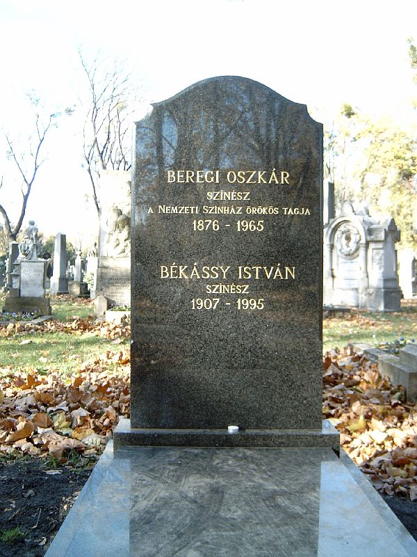 Beregi Oszkár (Budapest, 1876. január 24. - Hollywood, 1965. október 18.) színészművész, rendező, igazgató és Békássy István (Békási) (Nyíregyháza, 1907. február 10.– 1995.) színész sírja Budapesten. Kerepesi temető: 34/1-1-36